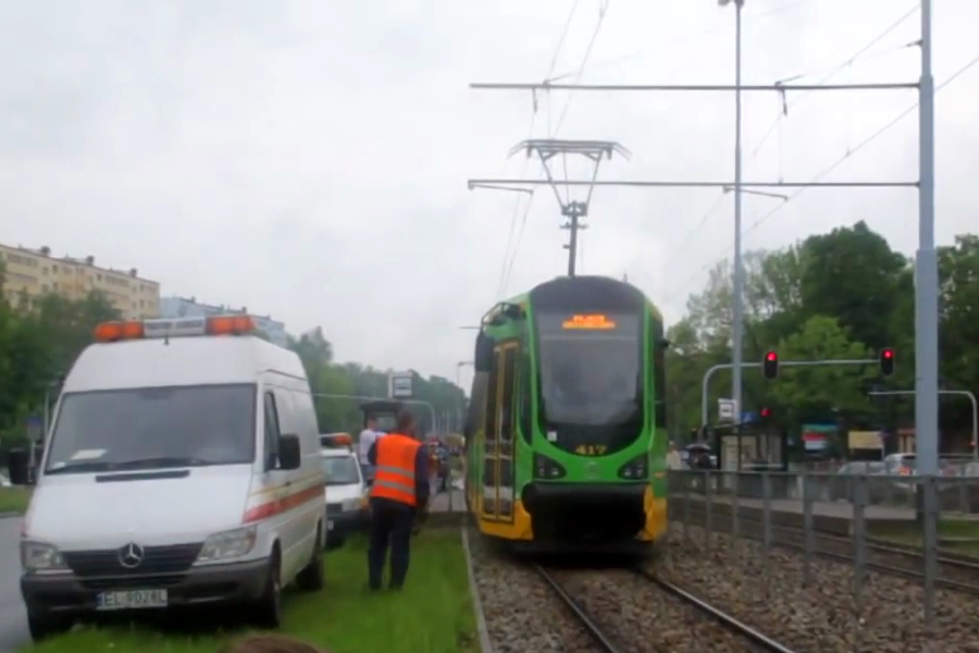 Tramwaj Moderus Beta MF 02 AC należący do MPK Poznań podczas testów w Łodzi.